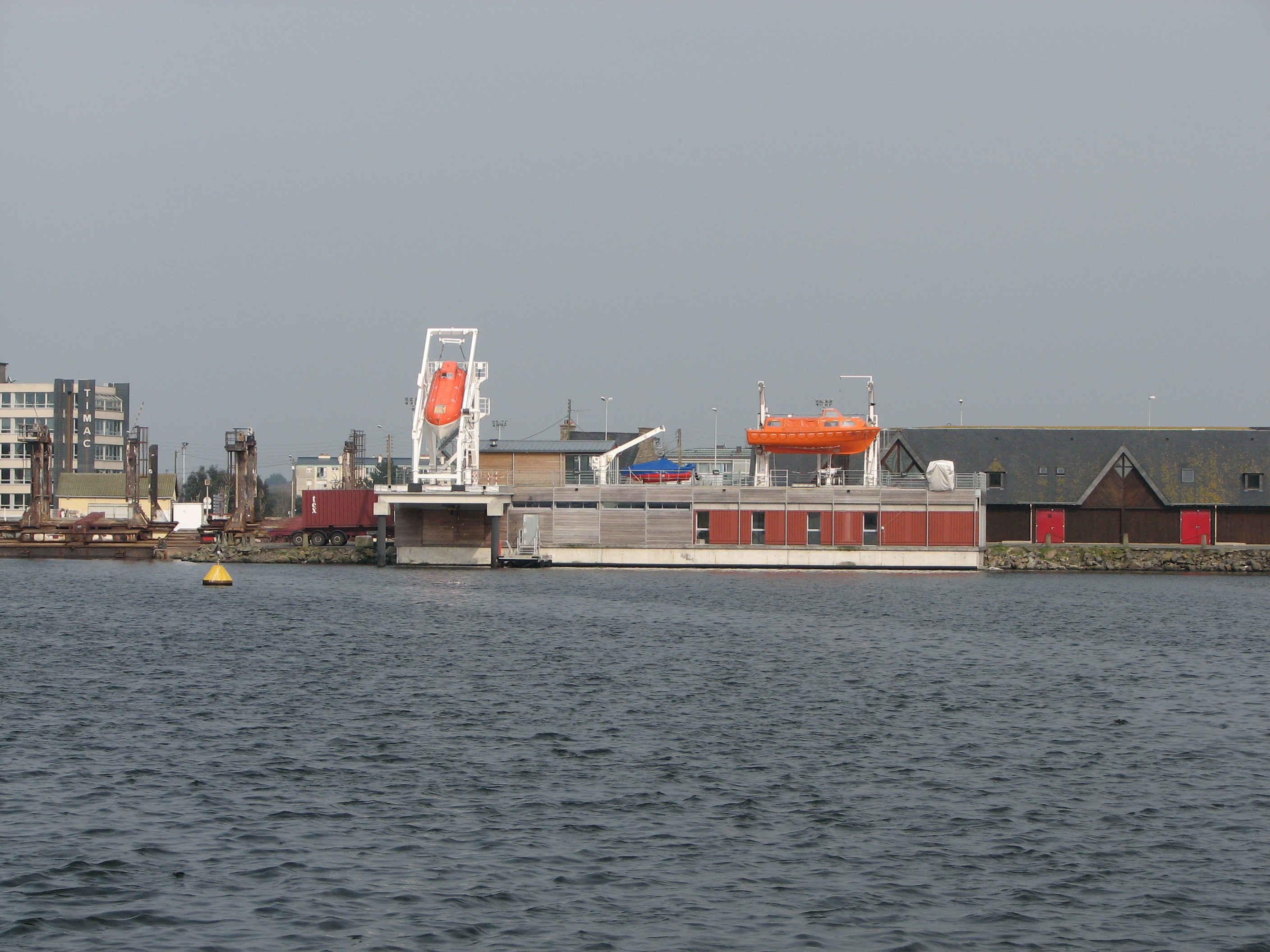 CESAME, plateforme d'entrainement à l'évacuation de navire de commerce dans le port de Saint-Malo CESAME, Training center of abandonning boat in Saint-Malo harbour